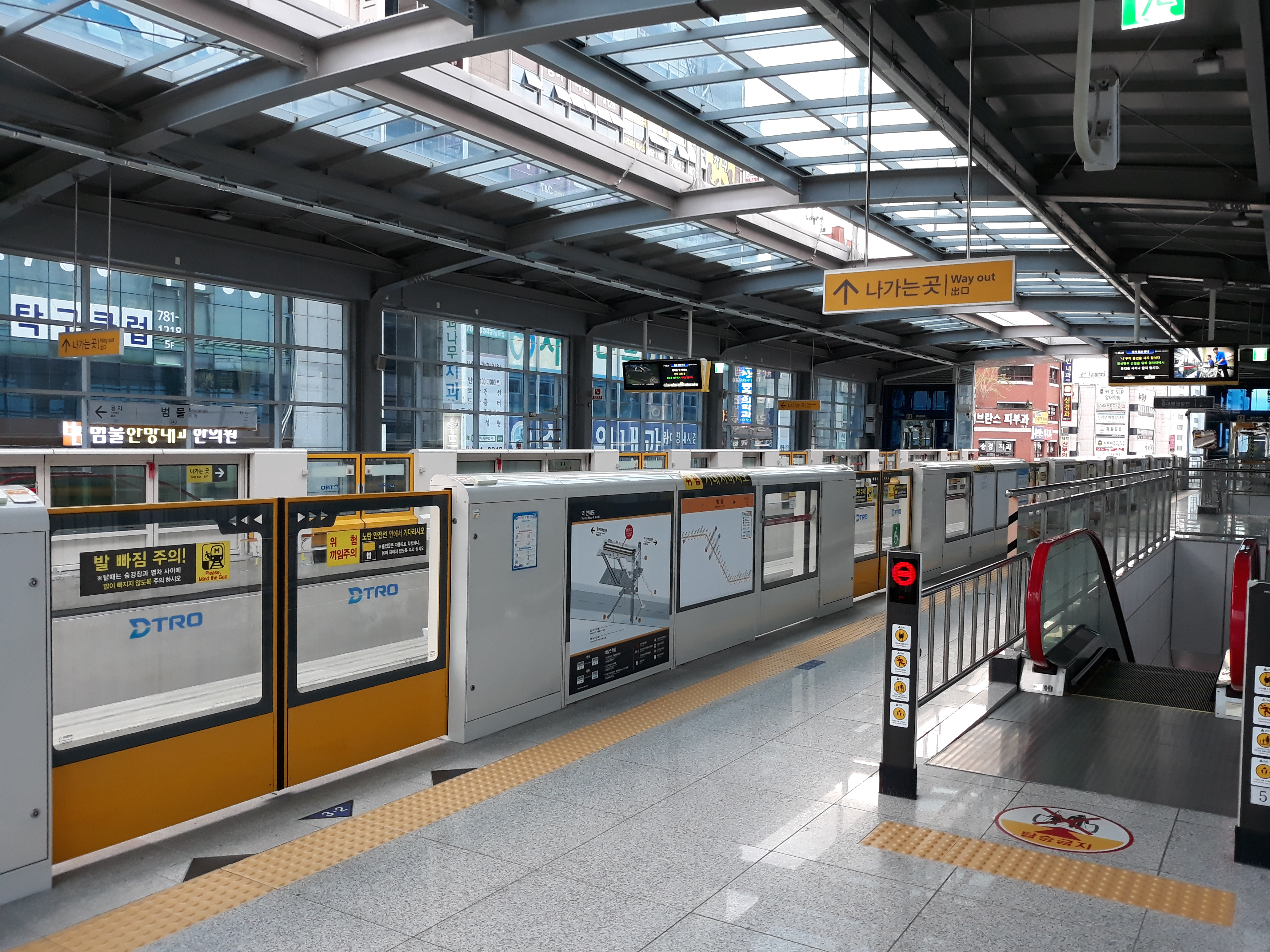 범물역 승강장(칠곡경대병원 방면)